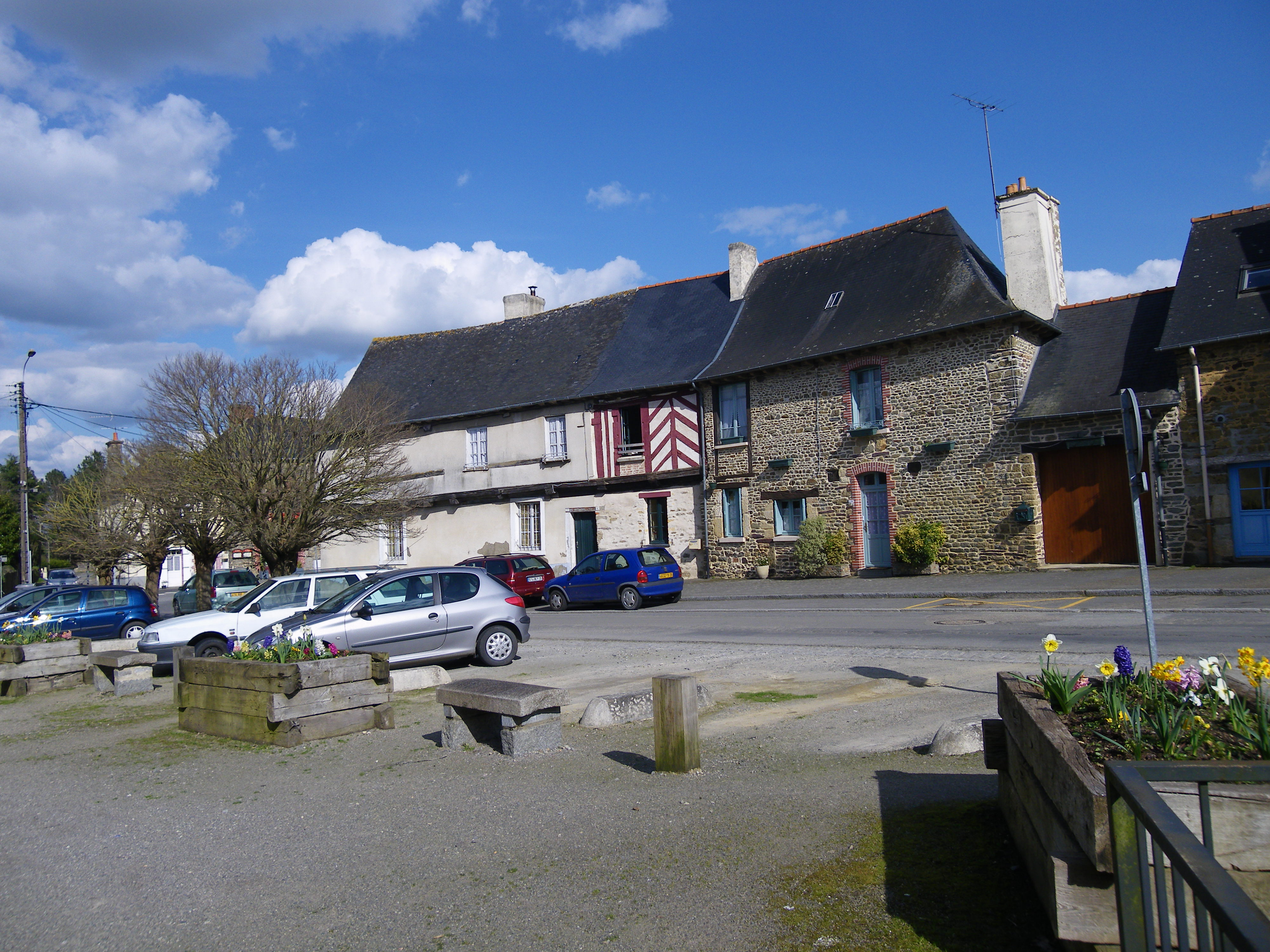 maison anciennes a st armel